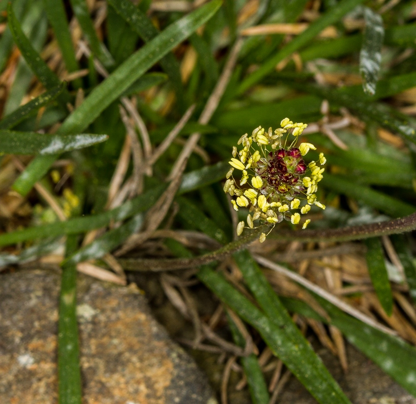 Arktisch-alpiner Garten Chemnitz: Strand-Wegerich